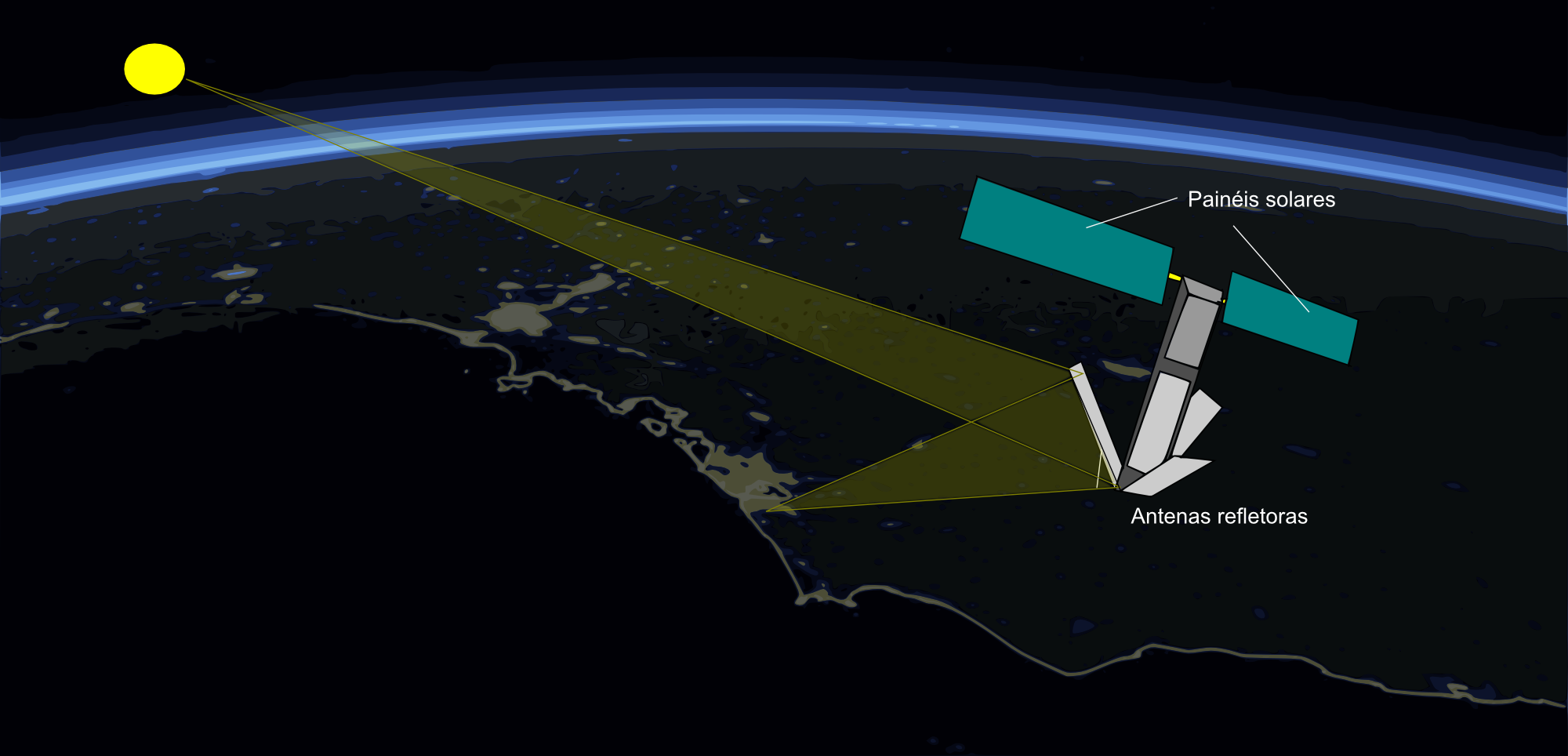 Esquema de um satélite Iridium refletindo a luz do Sol, causando um flare de satélite.